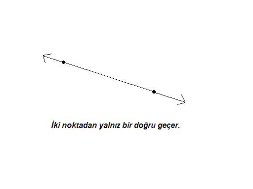 İki noktadan yalnız bir doğru geçtiğinin gösterilişi.